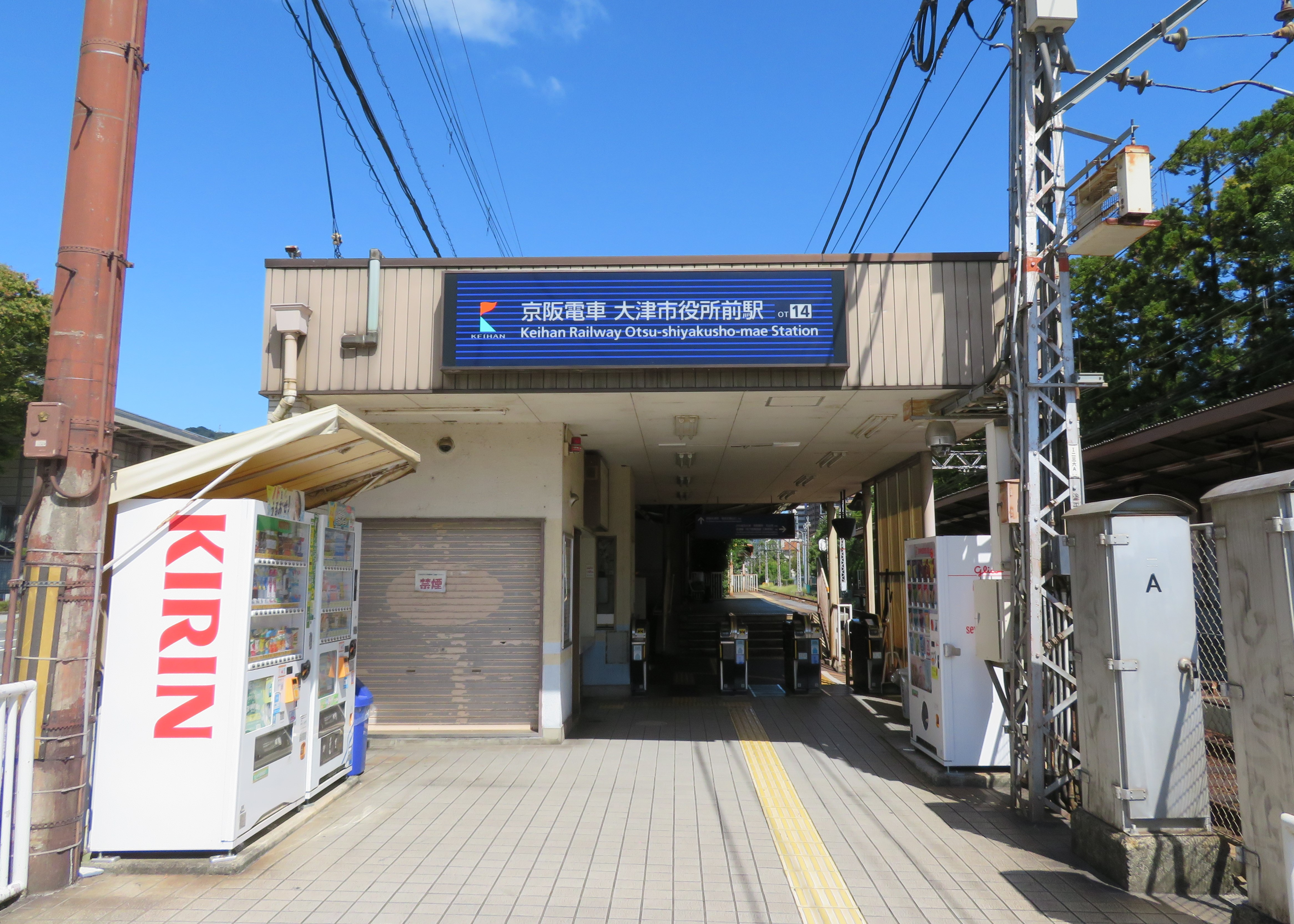 大津市役所前駅